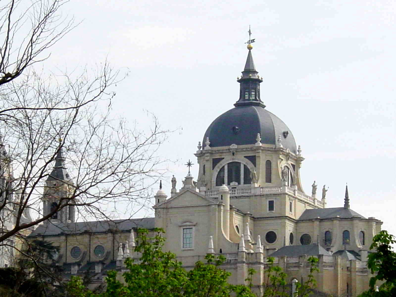 Madrid - Spain